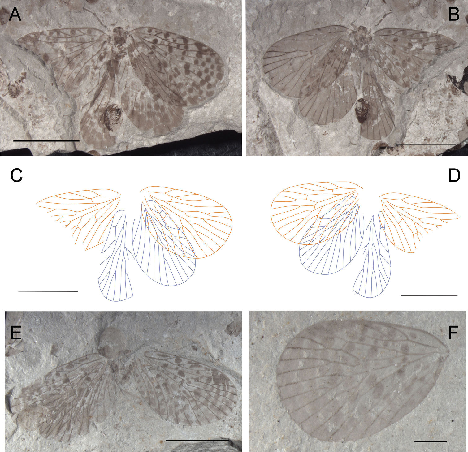 А-B. Фотографии части голотипа C-D. Чертежи части голотипа; E-F. Фотографии паратипов. Масштабные линии A–E — 5 мм. Масштабная линия F — 1 мм.